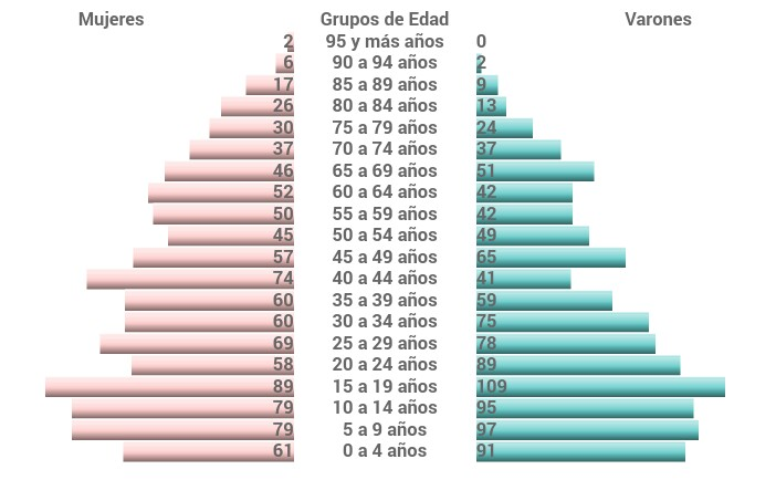 Población por grupos de edad Ataliva (Argentina) Censo 2010